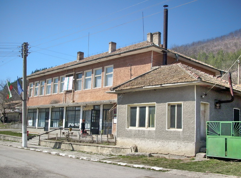 Сградата на Кръчмата,кметството (наместничеството) и Магазина